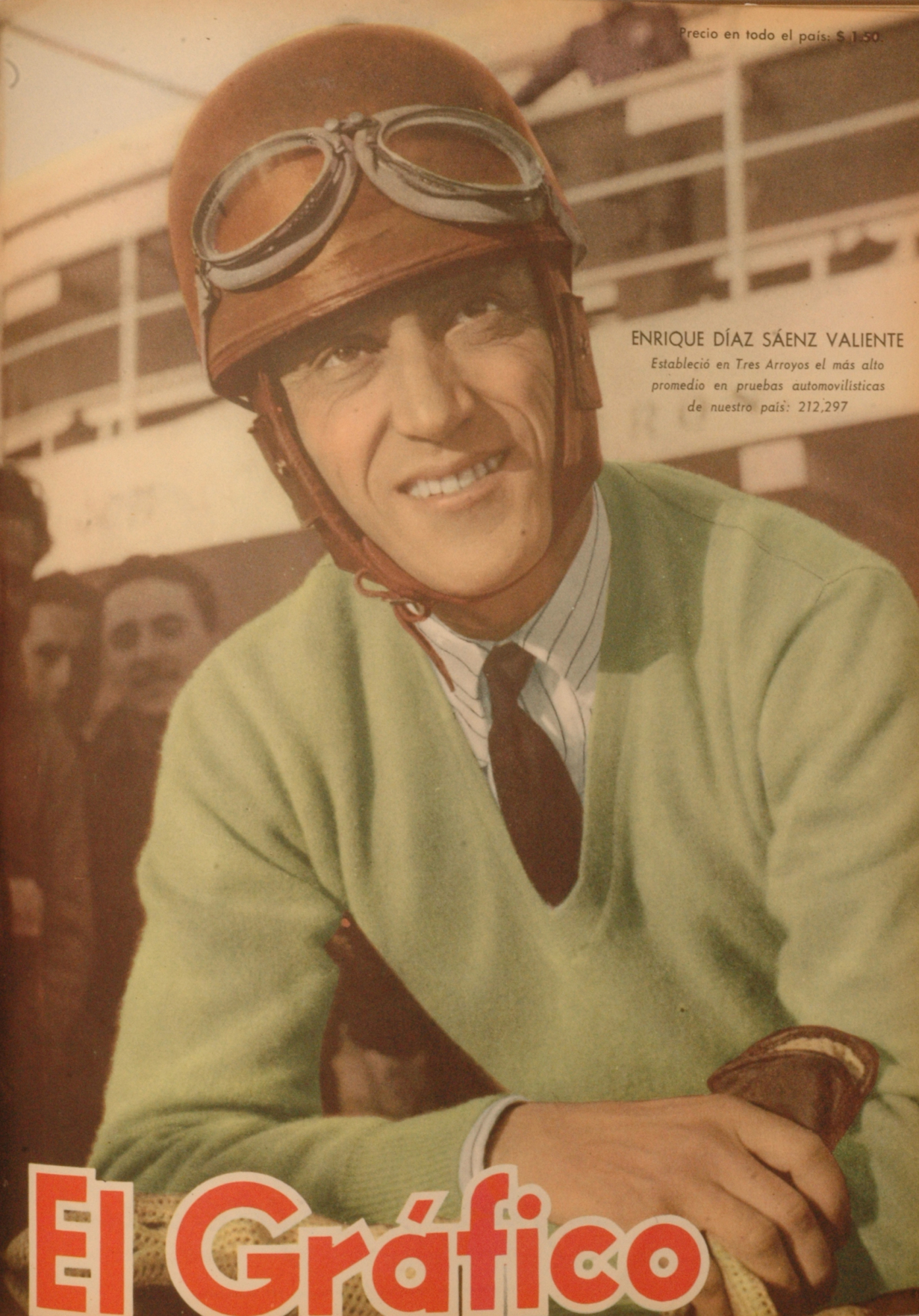 El Grafico del 17 de Septiembre de 1954. Edicion 1832